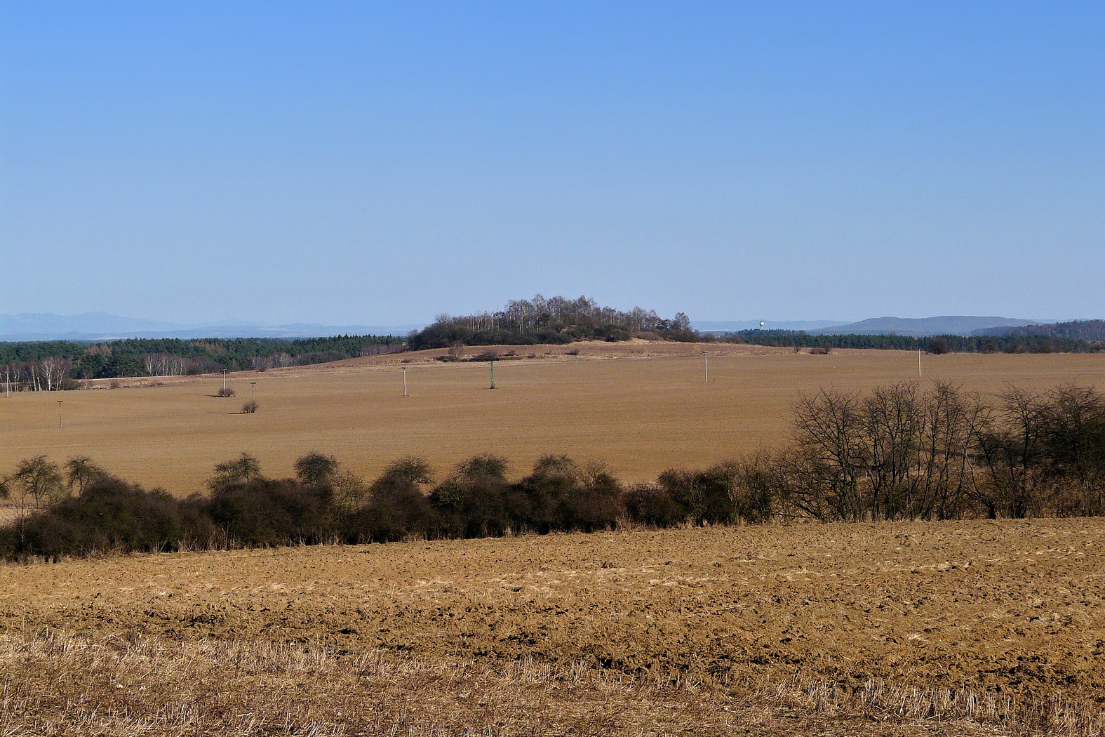 Vrch Komošín z Bezdědického klučku